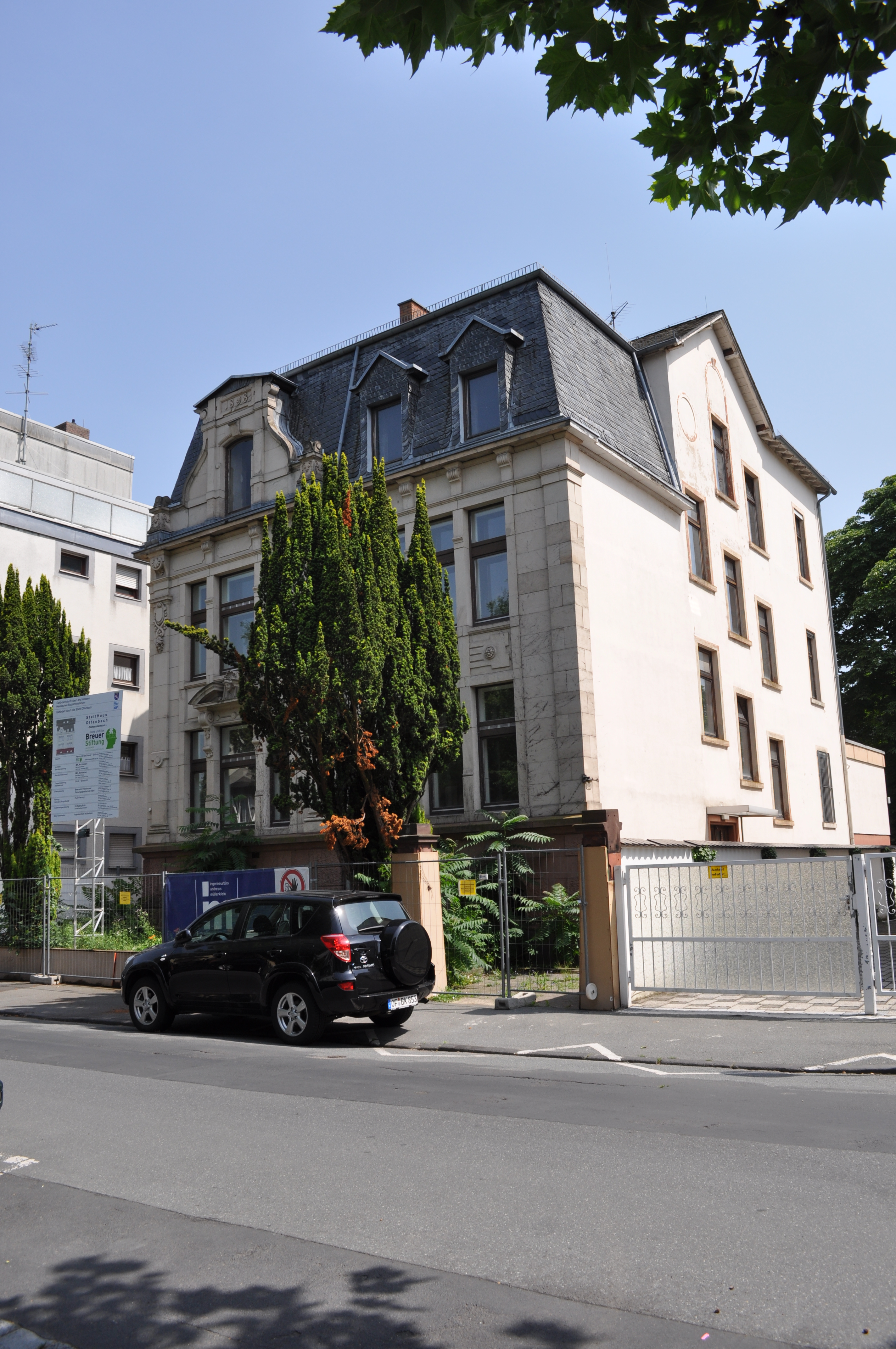 Offenbach, Geleitsstraße 94